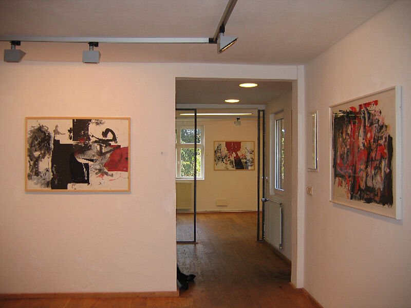 Bert Jaeger in der Galerie am Klostersee